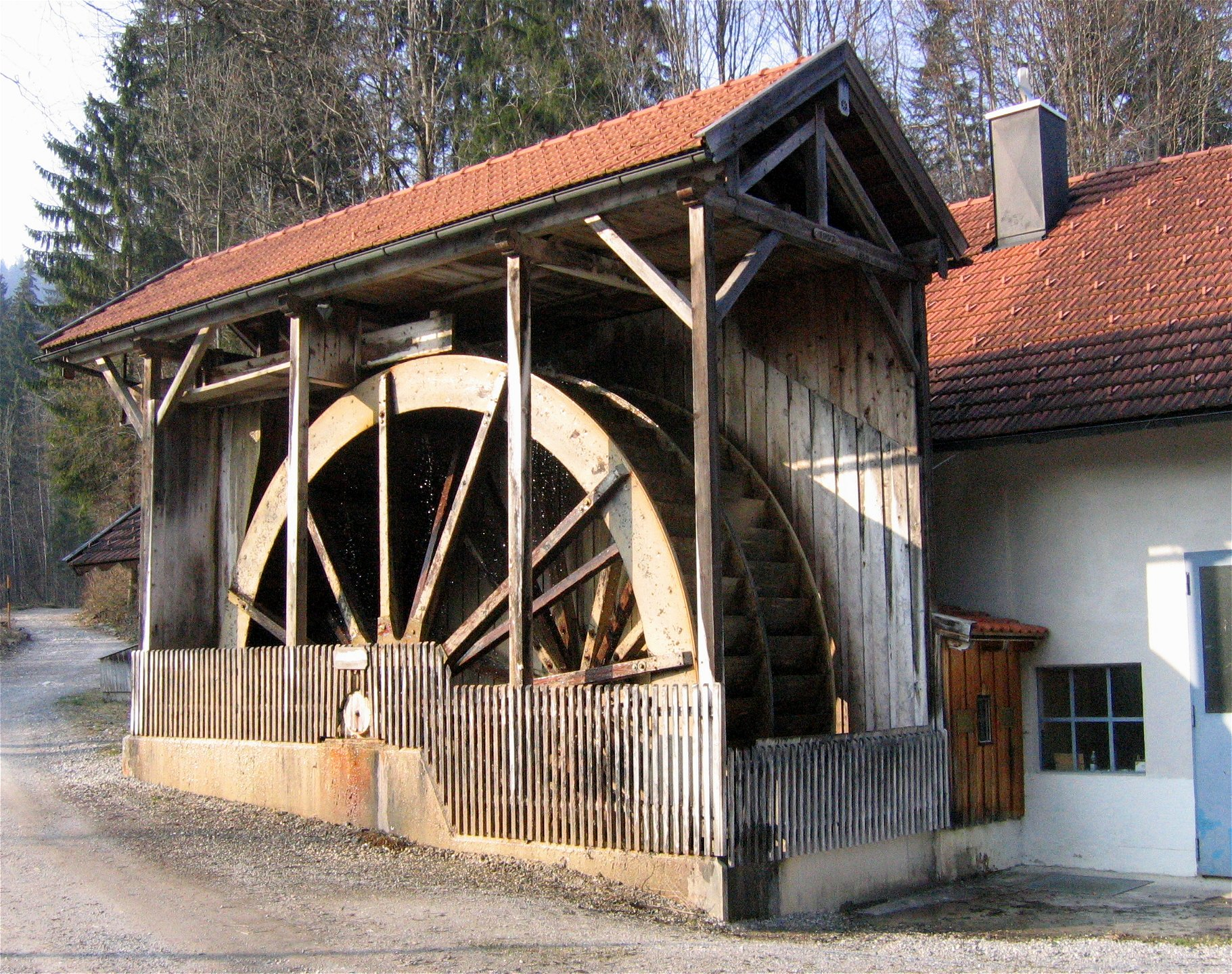 Wasserkraftanlage in Kiefersfelden, Schoeffau, Spitzname der Anlage "Miss Soffi". Anlagenleistung: 20,0 kW Durchmesser: 7 m Schluckvermögen: 320 l/sec Drehzahl: 4 U/min Drehmoment: 95.000 Nm Baujahr: 1997 (Quelle :[1])